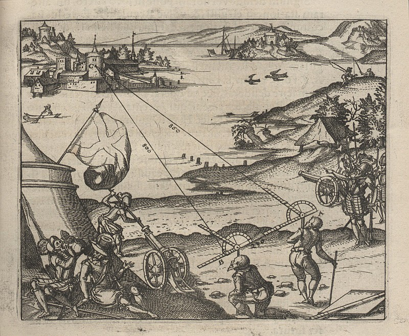 Original image description from the Deutsche Fotothek Geometrie & Vermessung & Winkelmesser